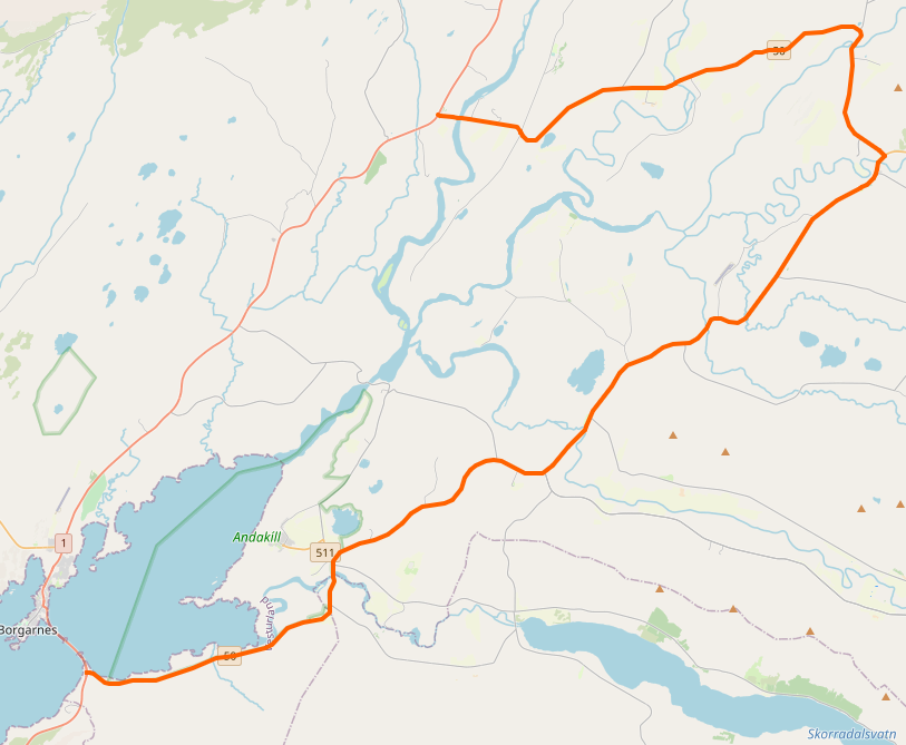 Der Verlauf der Straße 50 in Island. Die Karte wurde aus OpenStreetMap kopiert mit den dort gesammelten Daten der Gemeinschaft. Dieser Kartenausschnitt kann unvollständig und fehlerhaft sein.